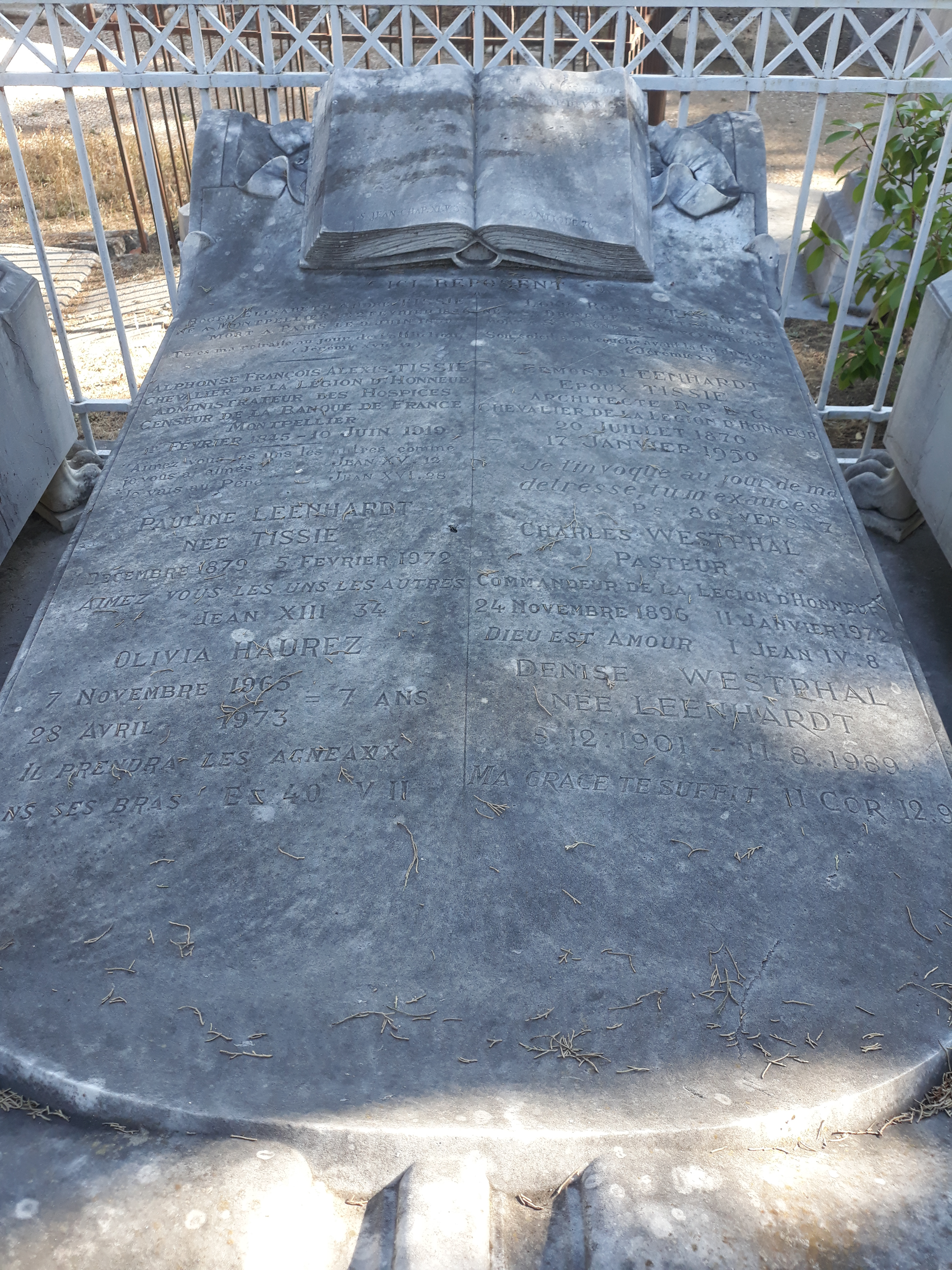 Das Grab des französischen Arhitekten Edmond Leenhardt im Familiengrab auf dem protestantischen Friedhof Montpellier. Beigesetzt auch sein Schwiegersohn, der reformierte Pfarrer Charles Westphal.